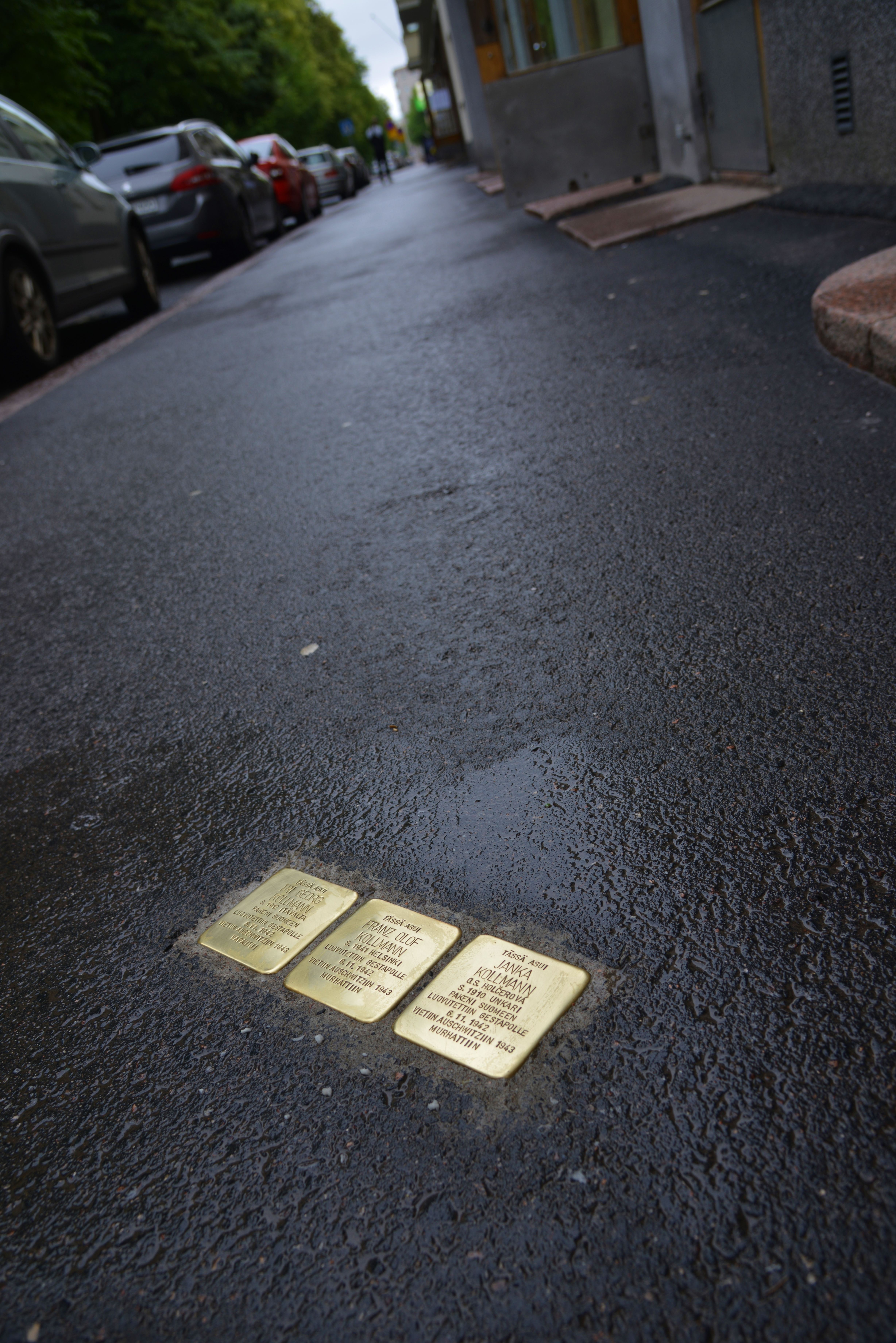 Stolpersteine in Helsinki für Familie Kollmann